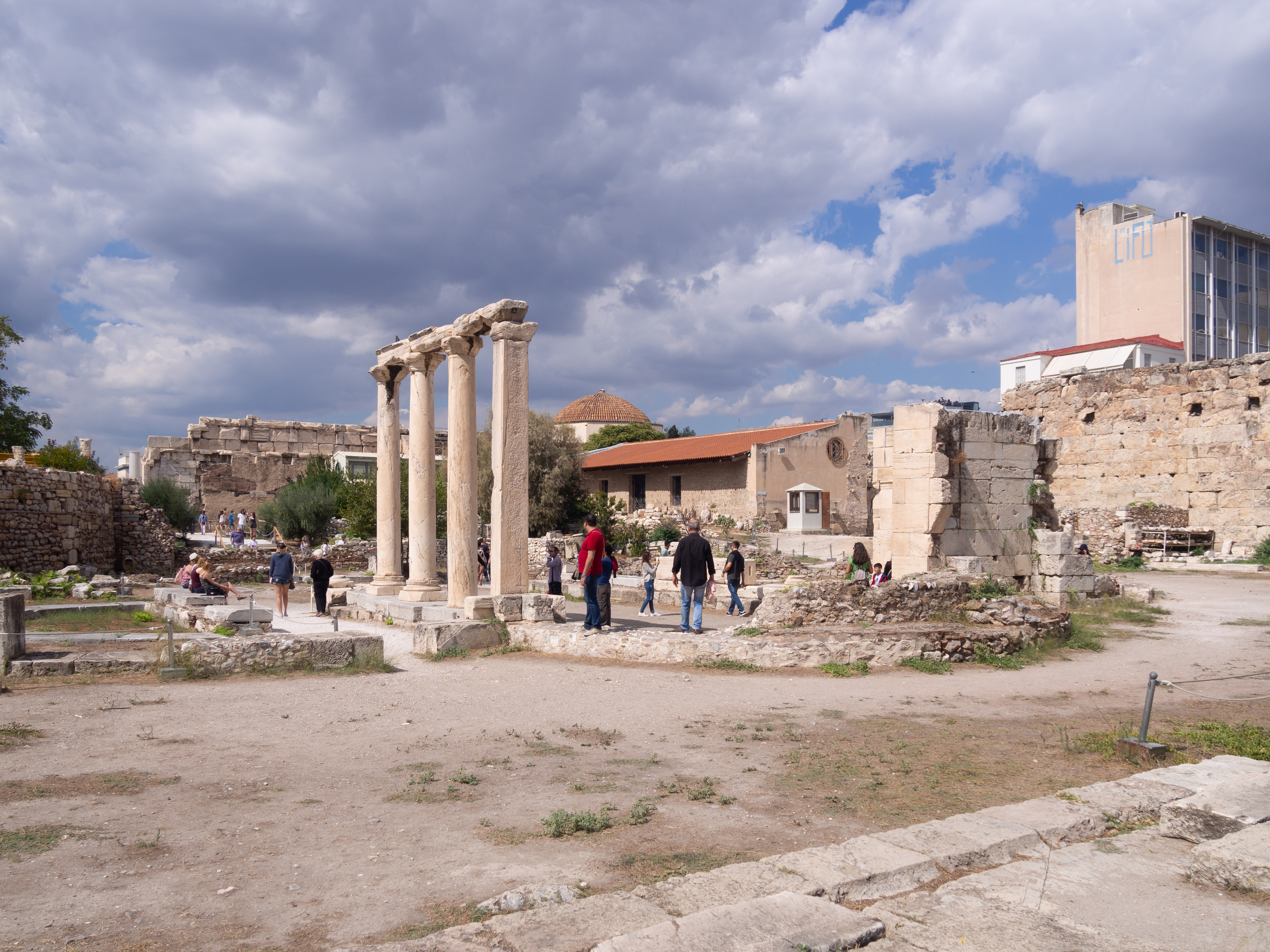 Βιβλιοθήκη Αδριανού«Βιβλιοθήκη Αδριανού»